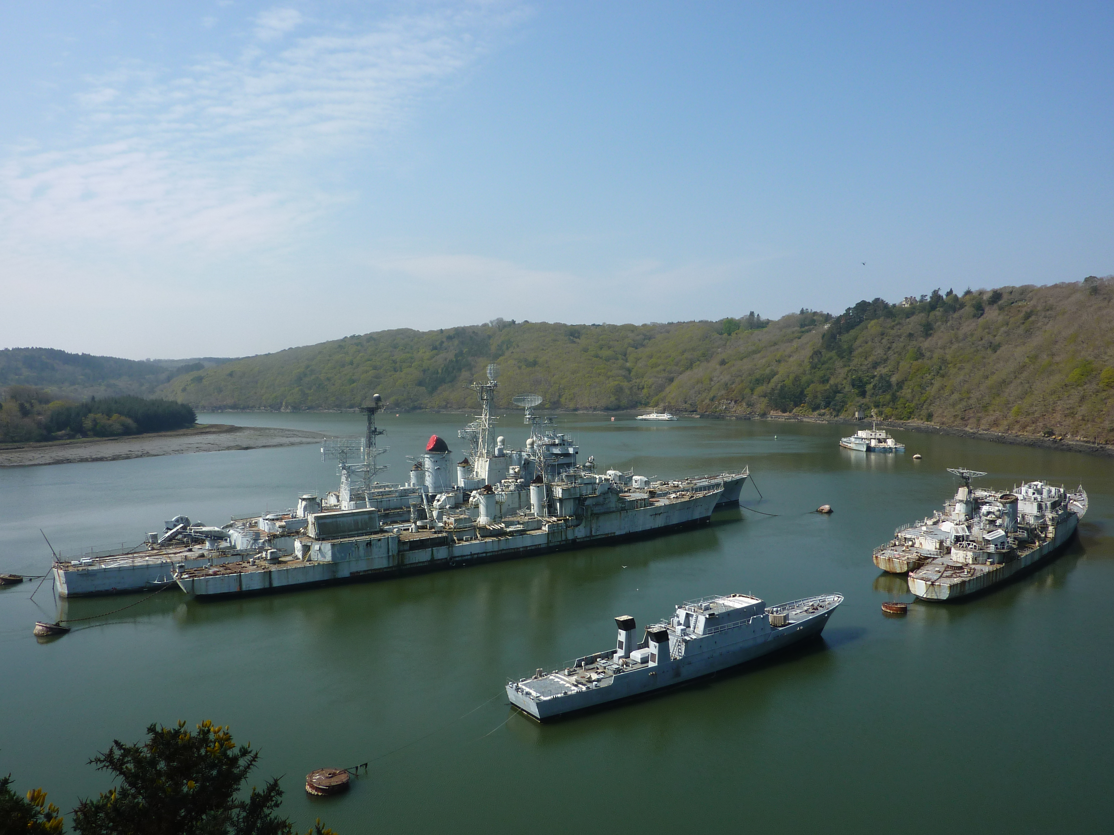 Cimetière de bateaux militaires près de l'abbaye de Landévenec